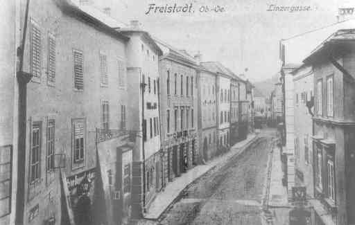 Die Eisengasse (damals: Linzergasse) um 1900